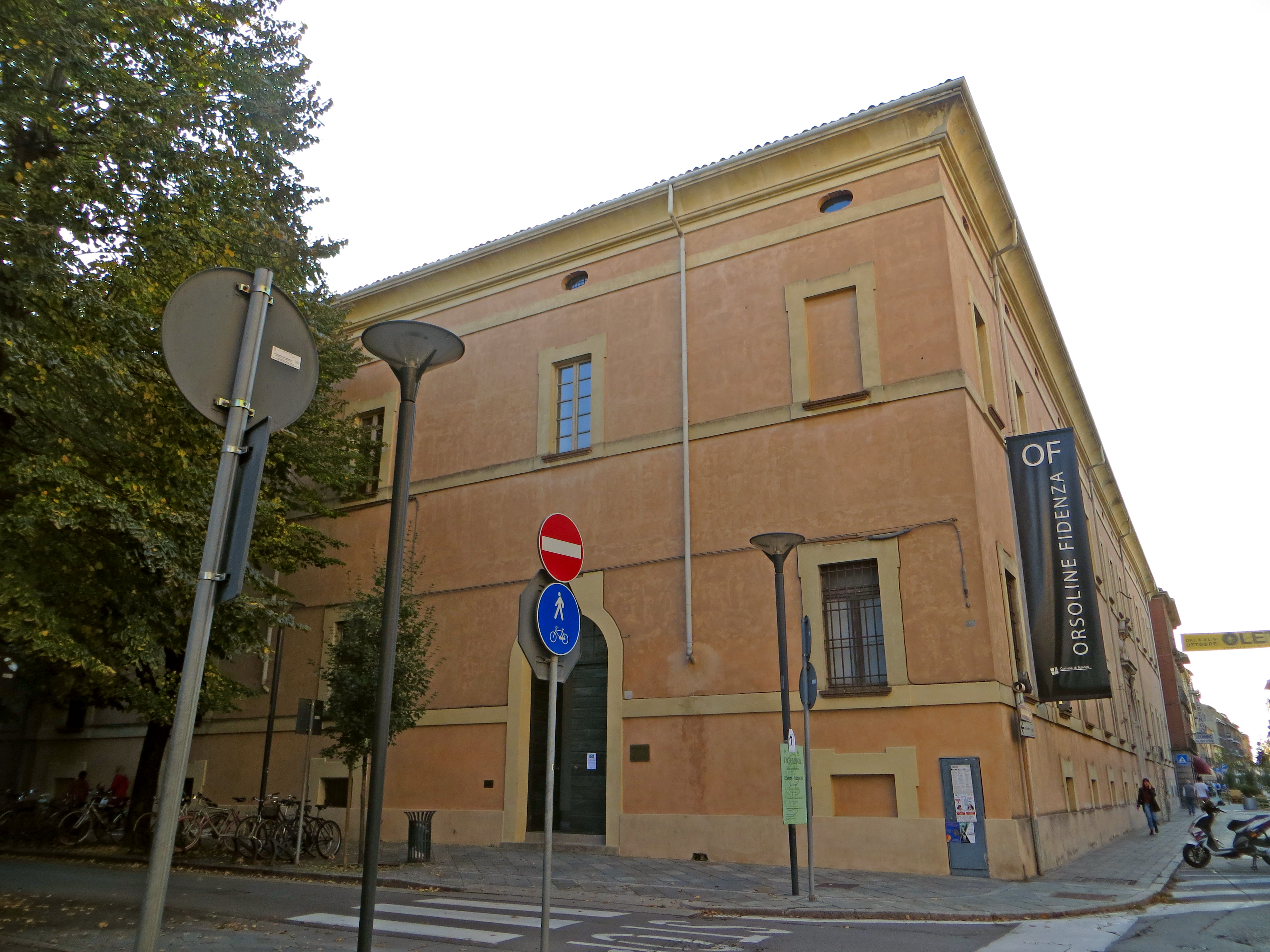 Palazzo delle Orsoline (Fidenza) - lato est